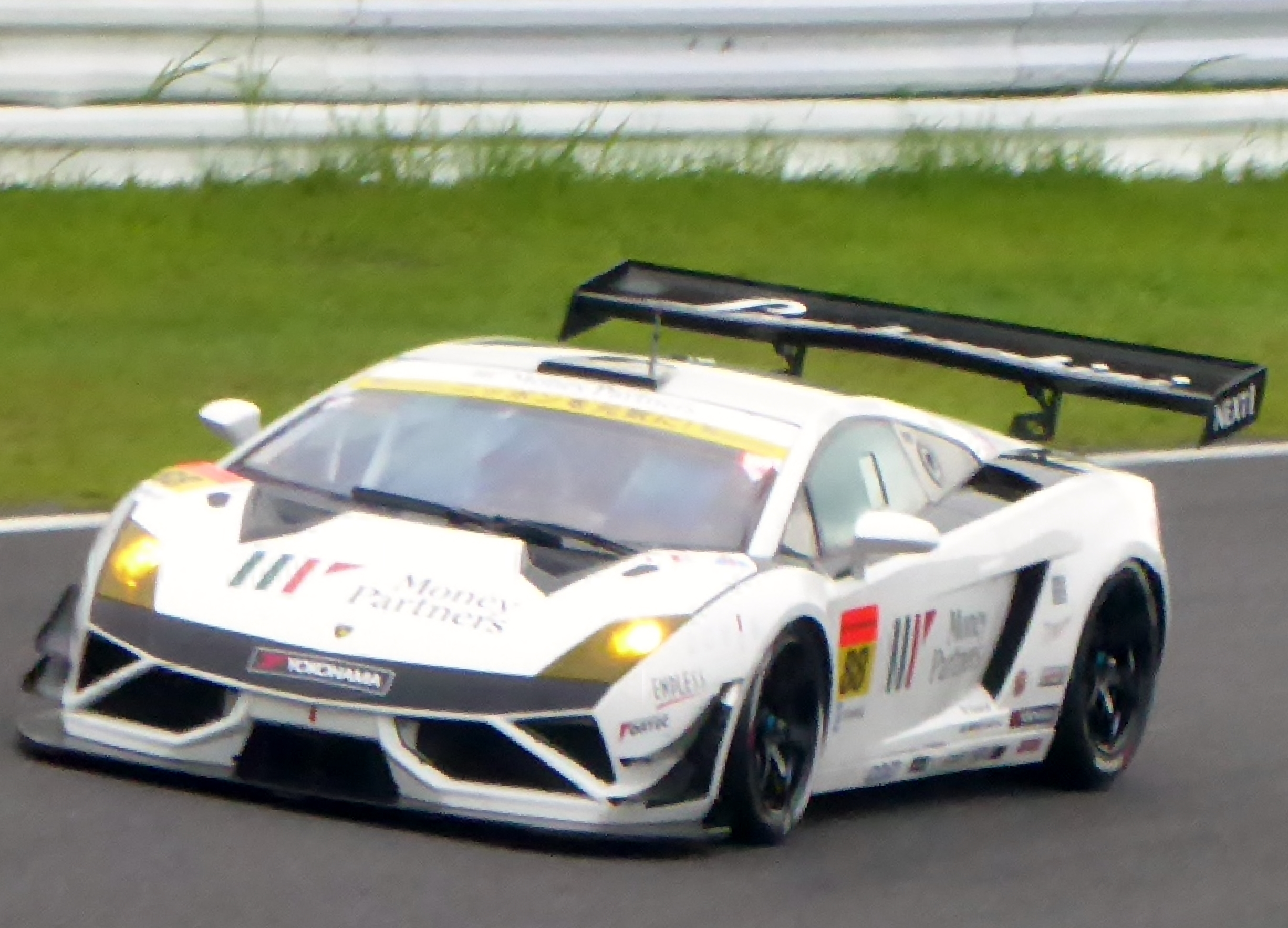 2015年鈴鹿1000㎞において88号車マネパランボルギーニGT3を撮影。